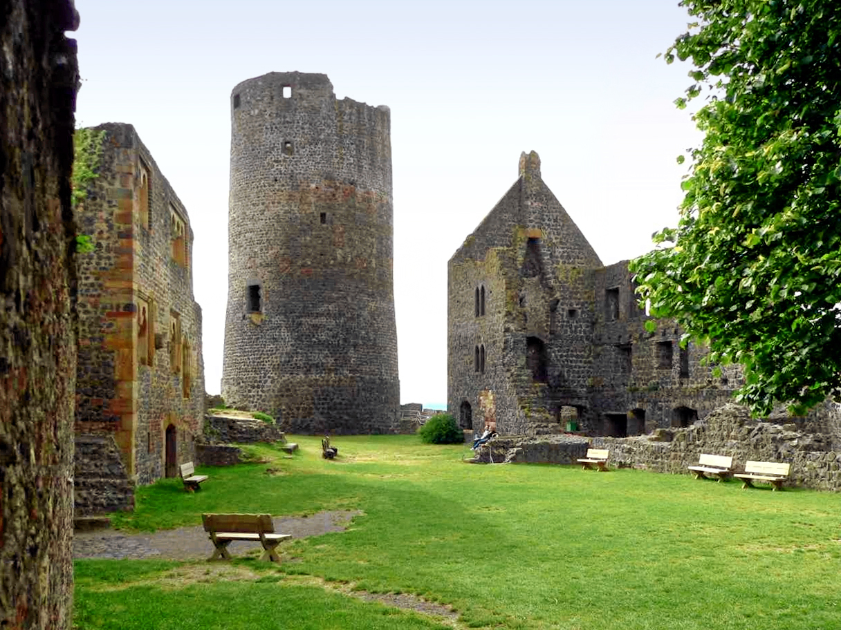 Burgruine Münzenberg - Innenhof der Kernburg, Hessen, Germany